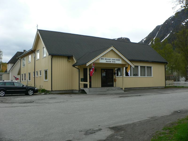 Den hellige ånd katolske kirke i Mosjøen